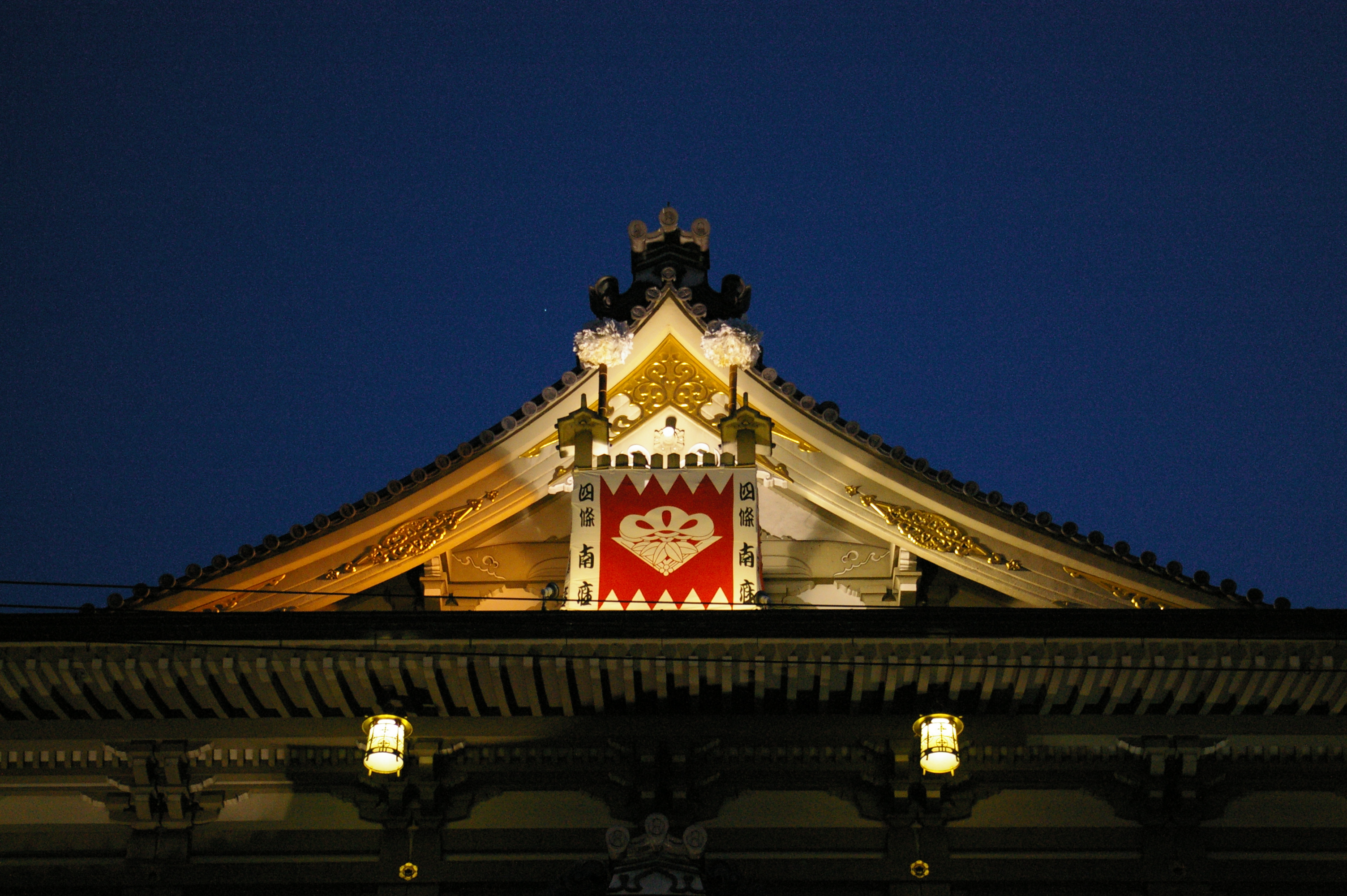 Minamiza, Kyoto